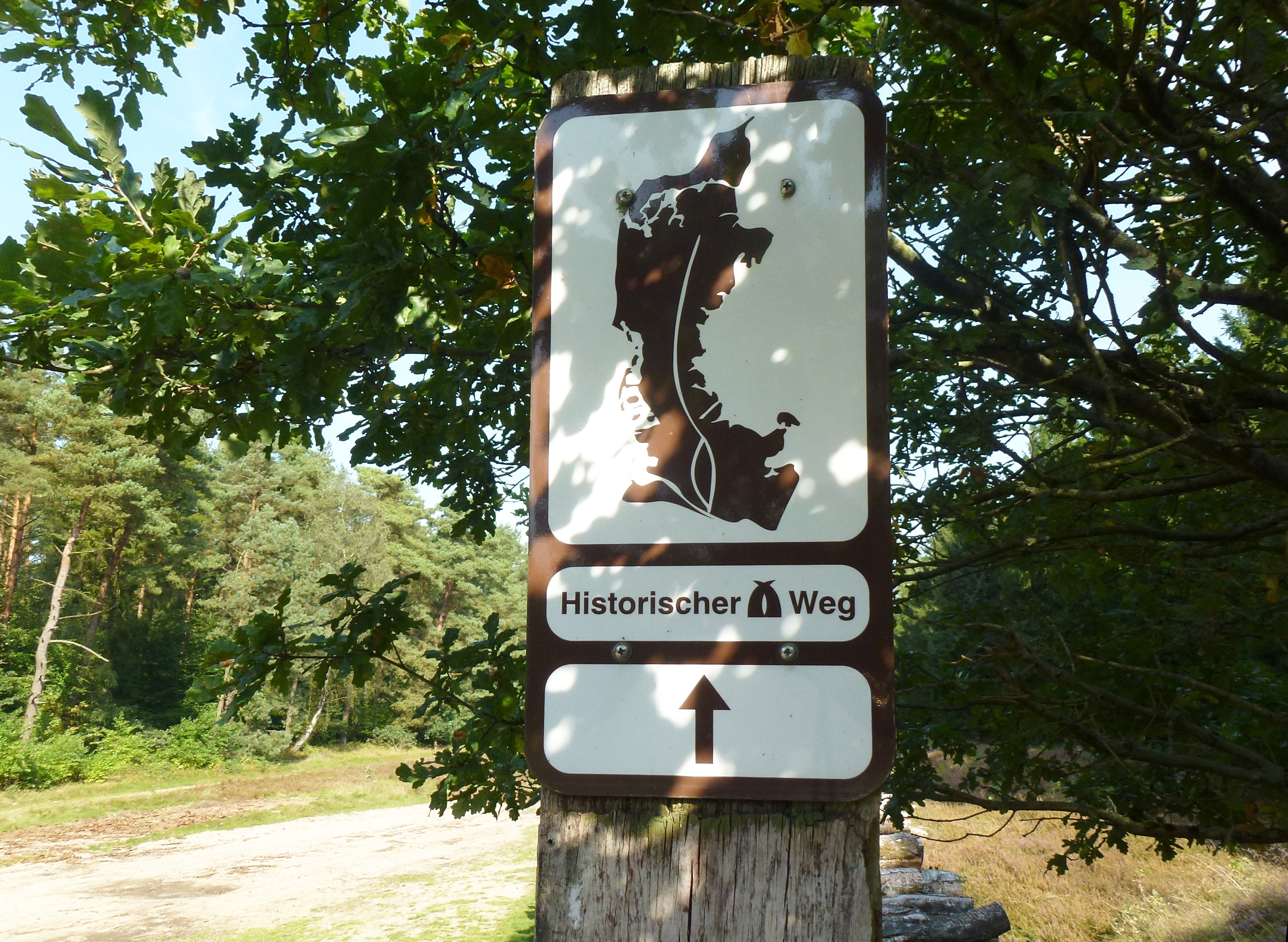 Ochsenweg in Kropp